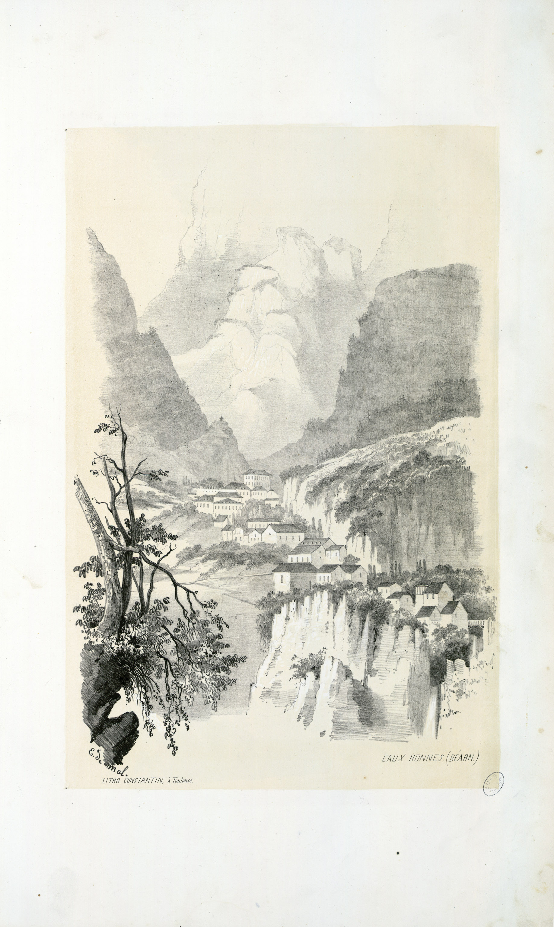 Fait partie d'un recueil de 15 planches lithographiées en camaïeu avec titre lithographié Ancely, René (1876 - 1966). Possesseur